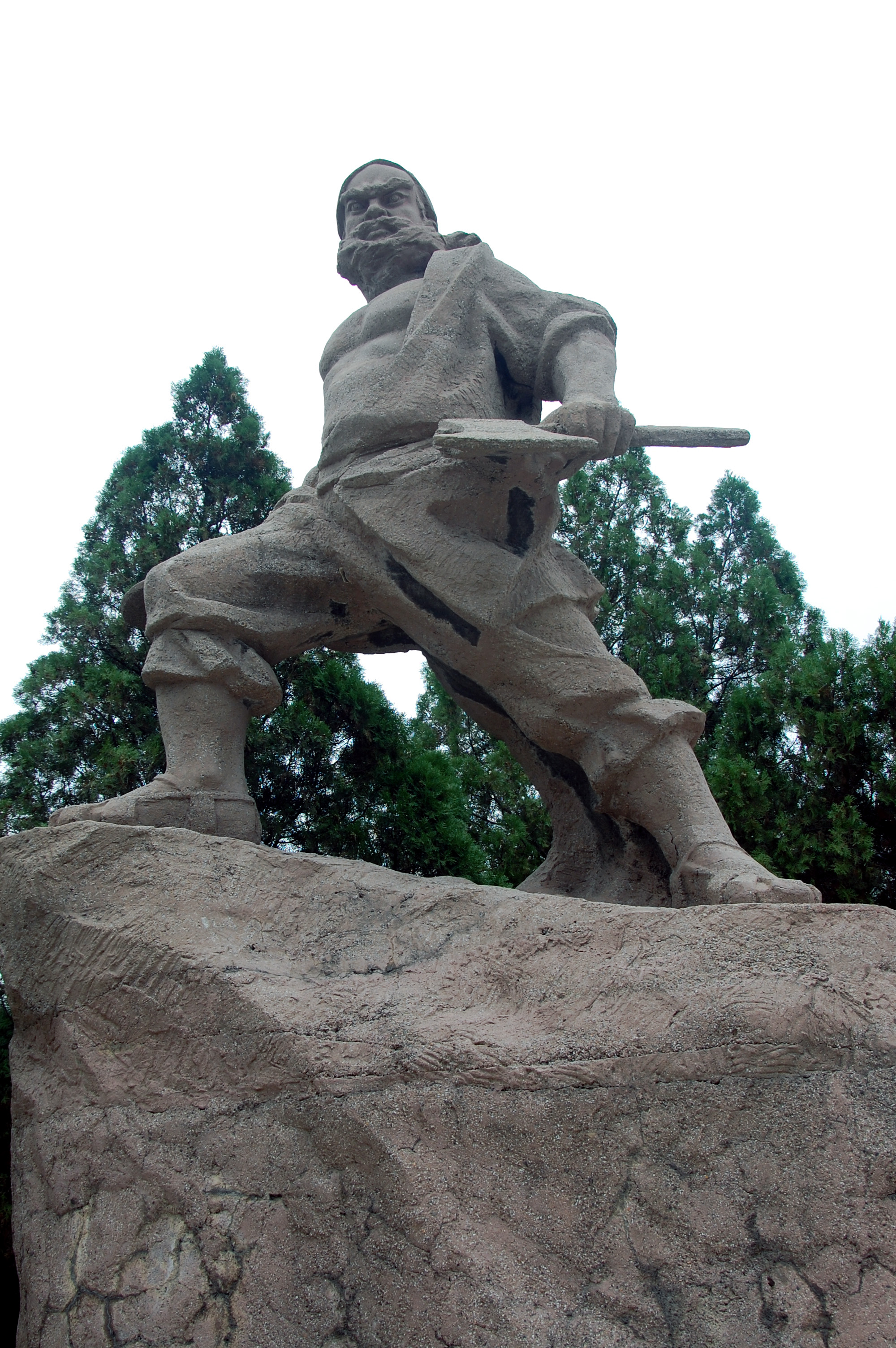 水泊梁山風景名勝区/水泊梁山风景名胜区